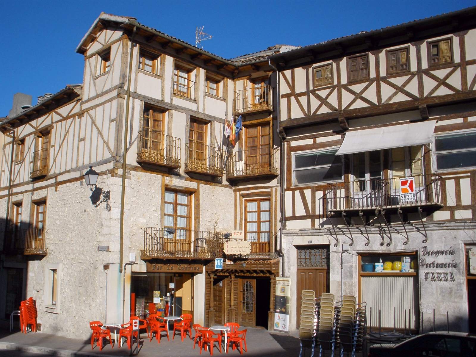 El Rincón Castellano (Cuéllar)